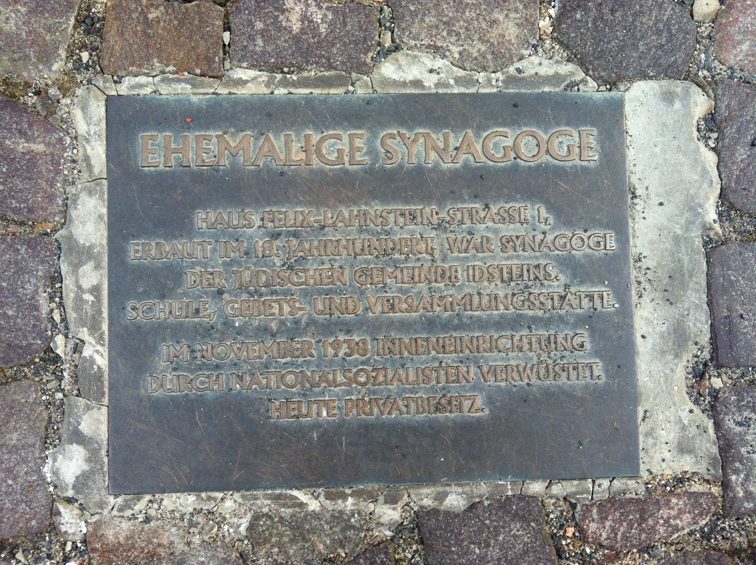 Die Informationstafel im Straßenbelag der Felix-Lahnstein-Straße